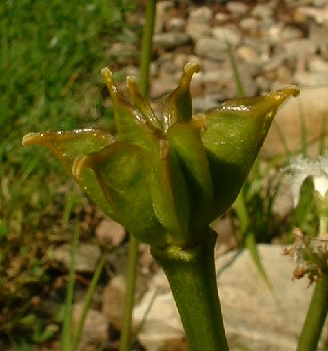 Caltha palustris (fruit), Autoreille, juin 2004